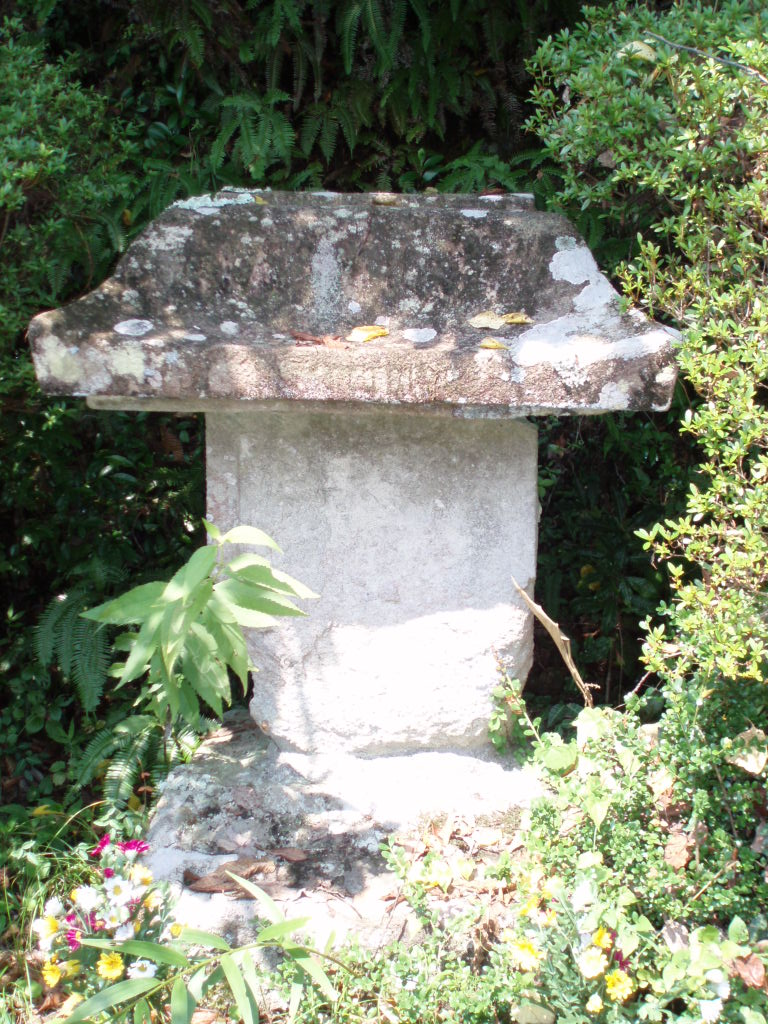 FUSHIOGAMI-oji